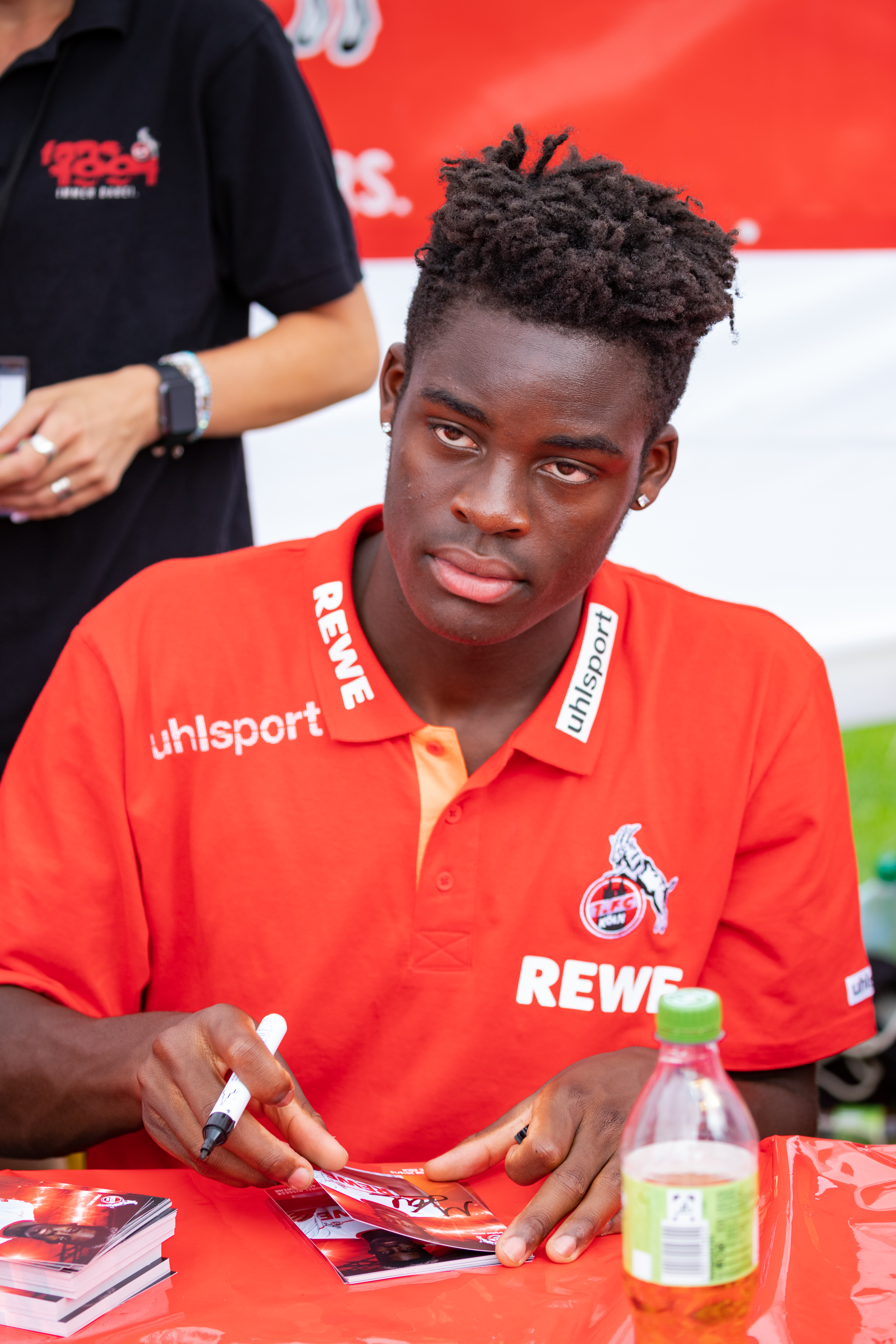 Yann Aurel Bisseck 1. FC Köln